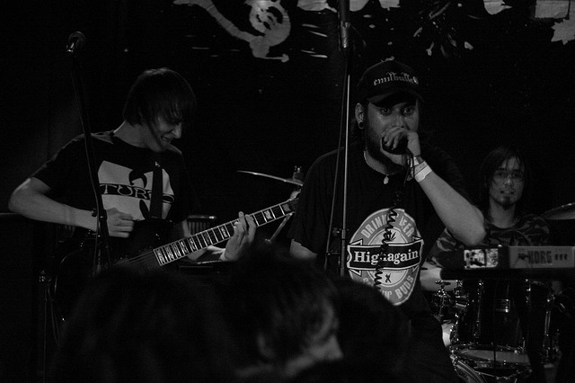 Leaf-fat